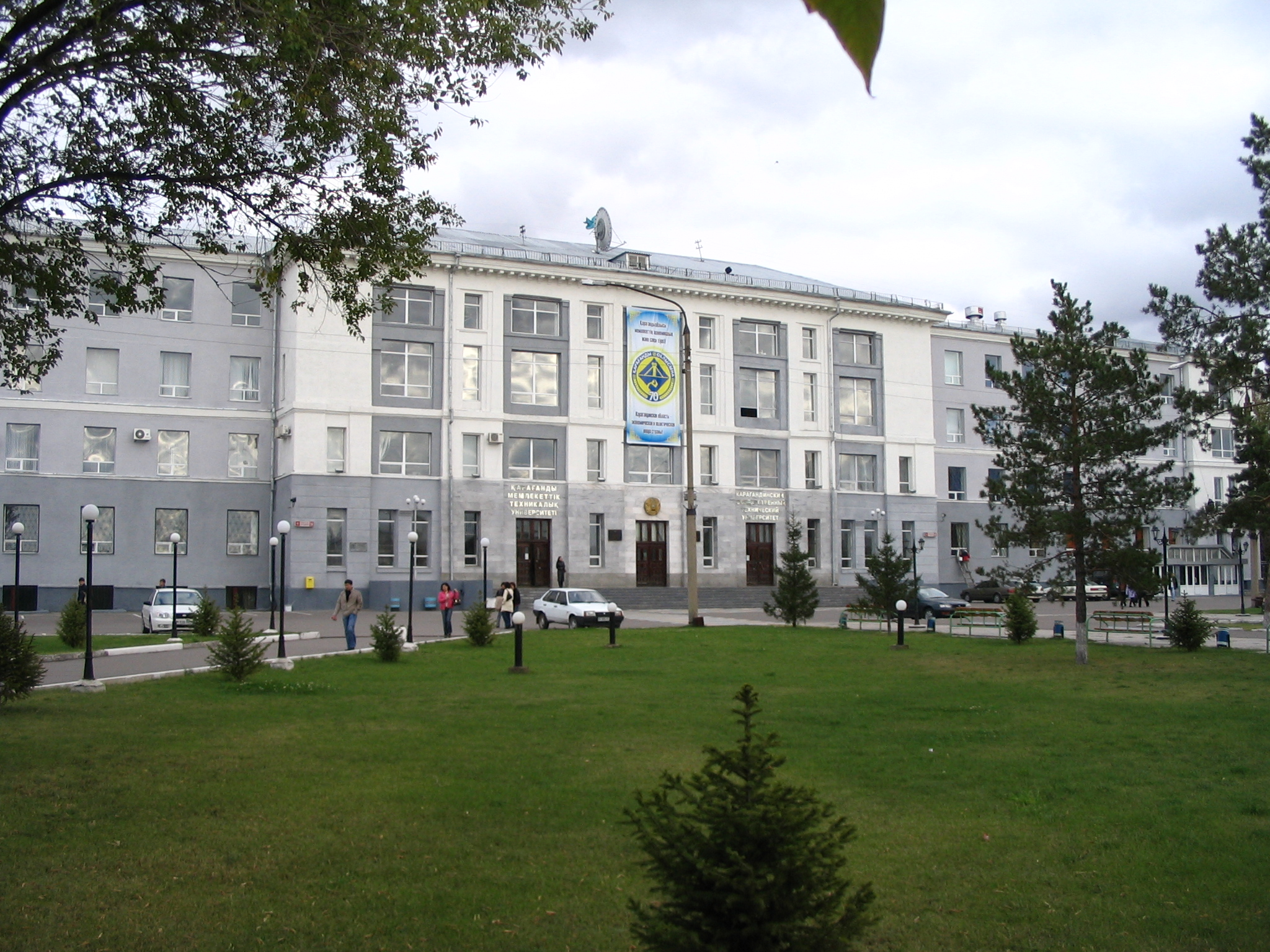 Карагандинский Государственный Технический Университет. Главный корпус